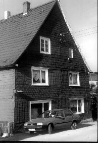 Das älteste Haus auf Assmannskotten